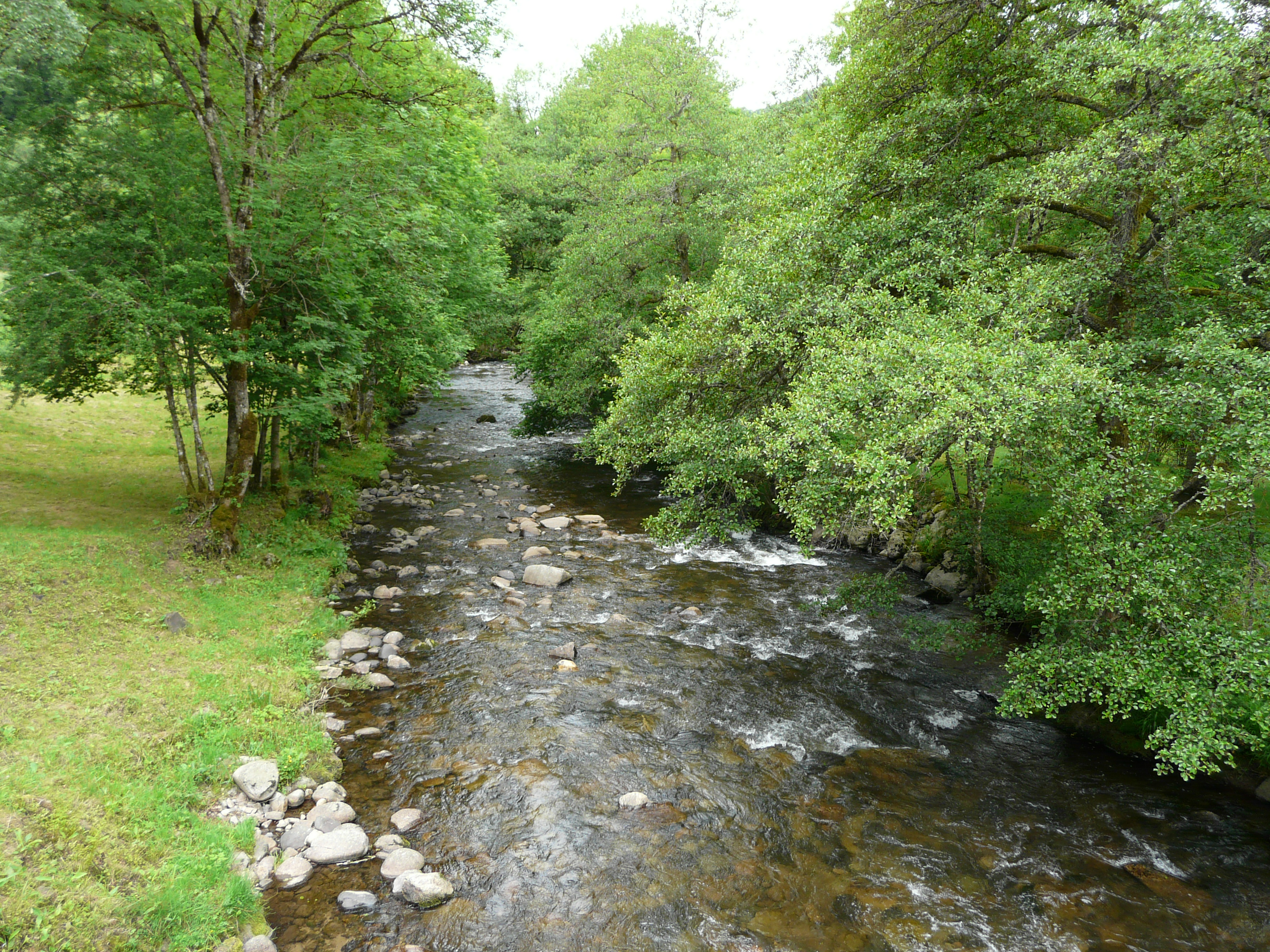 En aval du pont de la route départementale 73, la Burande marque la limite entre les communes de Larodde (à gauche) et Singles (à droite), Puy-de-Dôme, France.